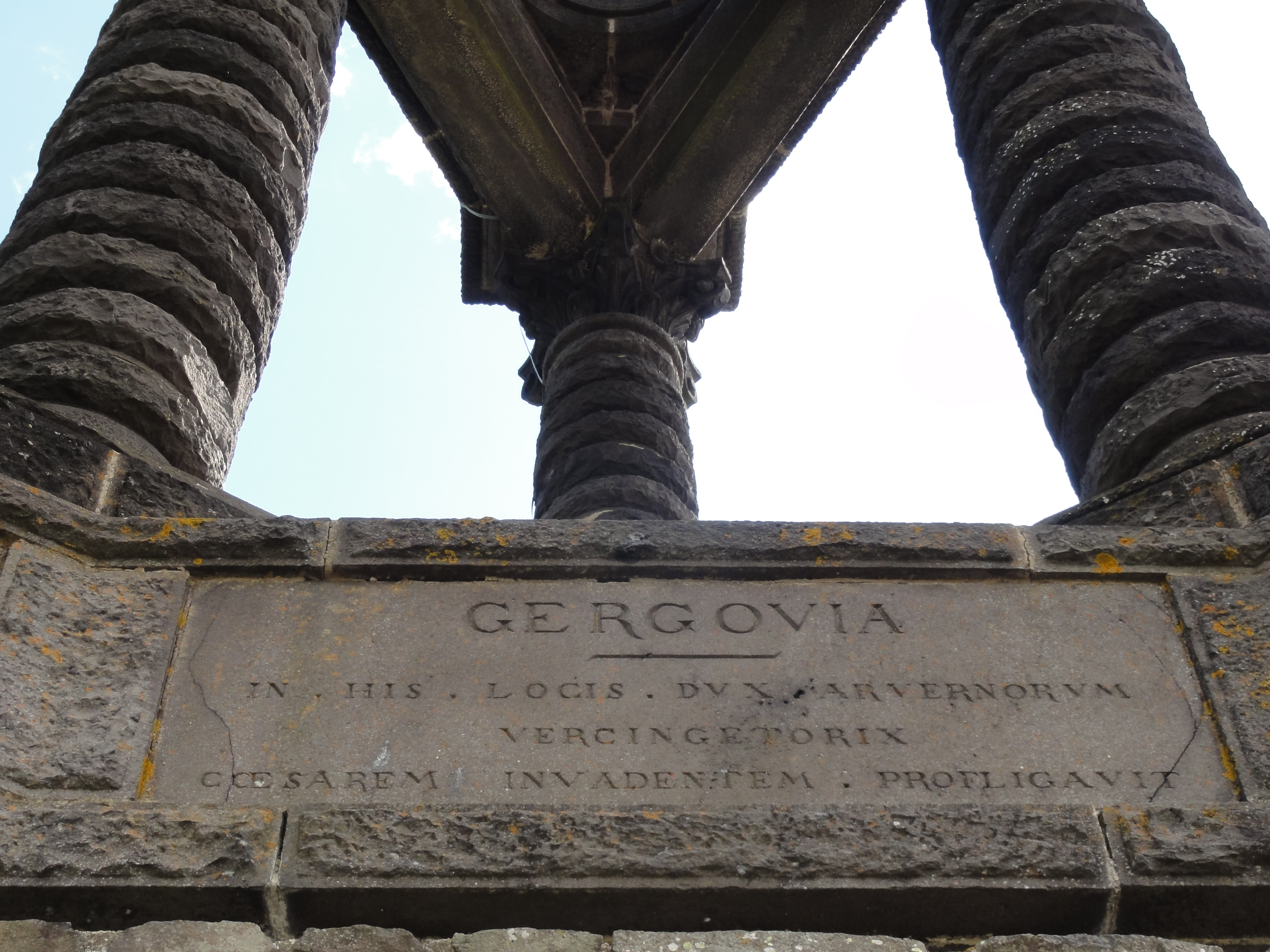 Une des plaques sur le monument commémoratif à Vercingétorix de Jean Teillard sur le plateau de Gergovie dans le Puy-de-Dôme avec une inscription en latin commémorant la victoire de Vercingétorix sur César. GERGOVIAIN HIS LOGIS DUX ARVERNORUMVERCINGETORIXC CESAREM INVADENTEM PROFLIGAVIT soit en français : GERGOVIEEN CE LIEU LE CHEF ARVERNEVERCINGETORIXA VAINCU L'ENVAHISSEUR CESAR